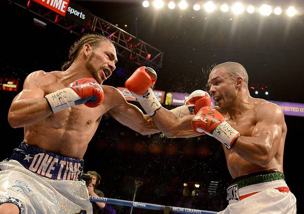 Keith Thurman vs Leonard Bundu, Las Vegas, 13 Dicembre 2014